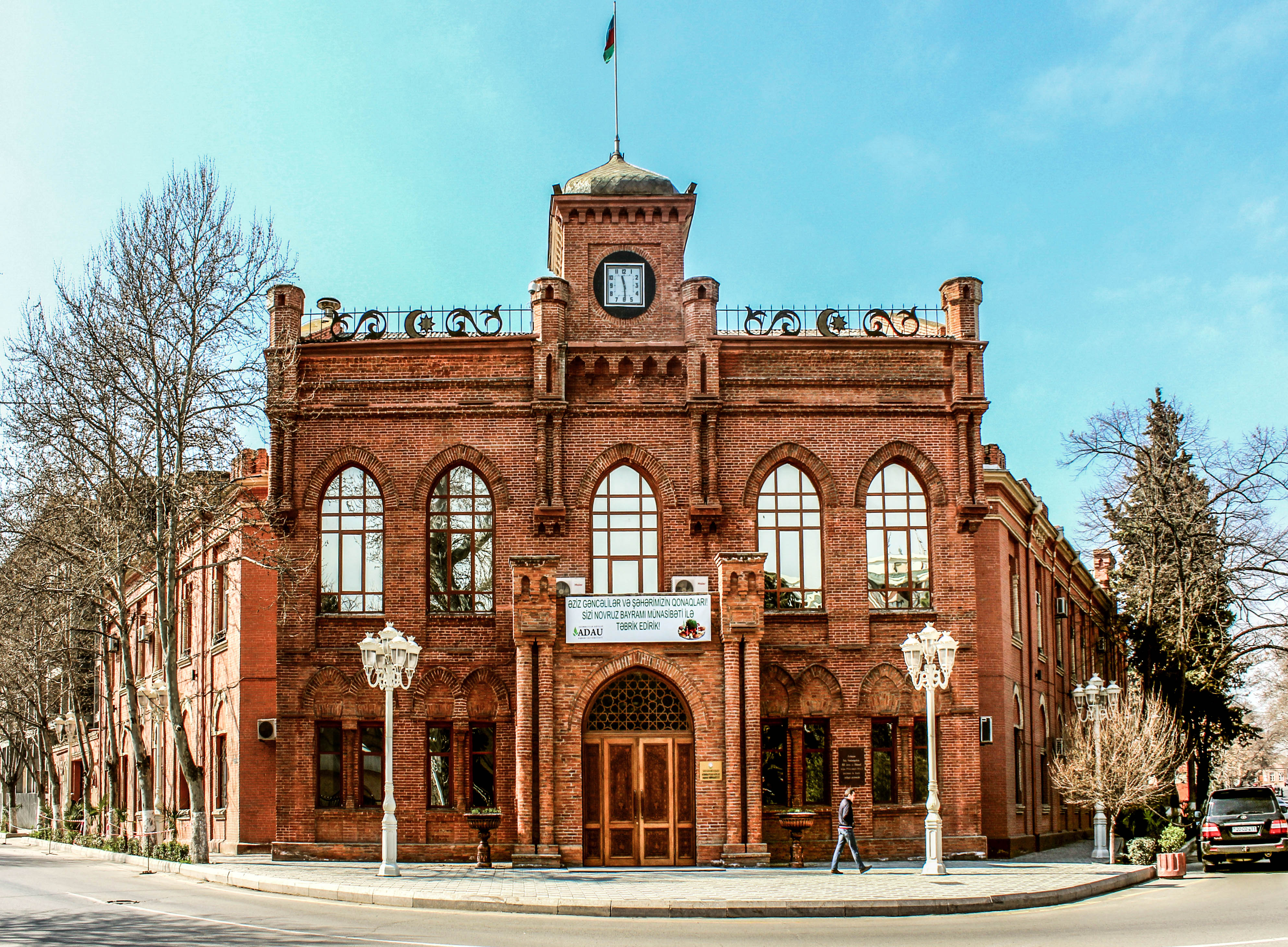 AXC parlamenti binası